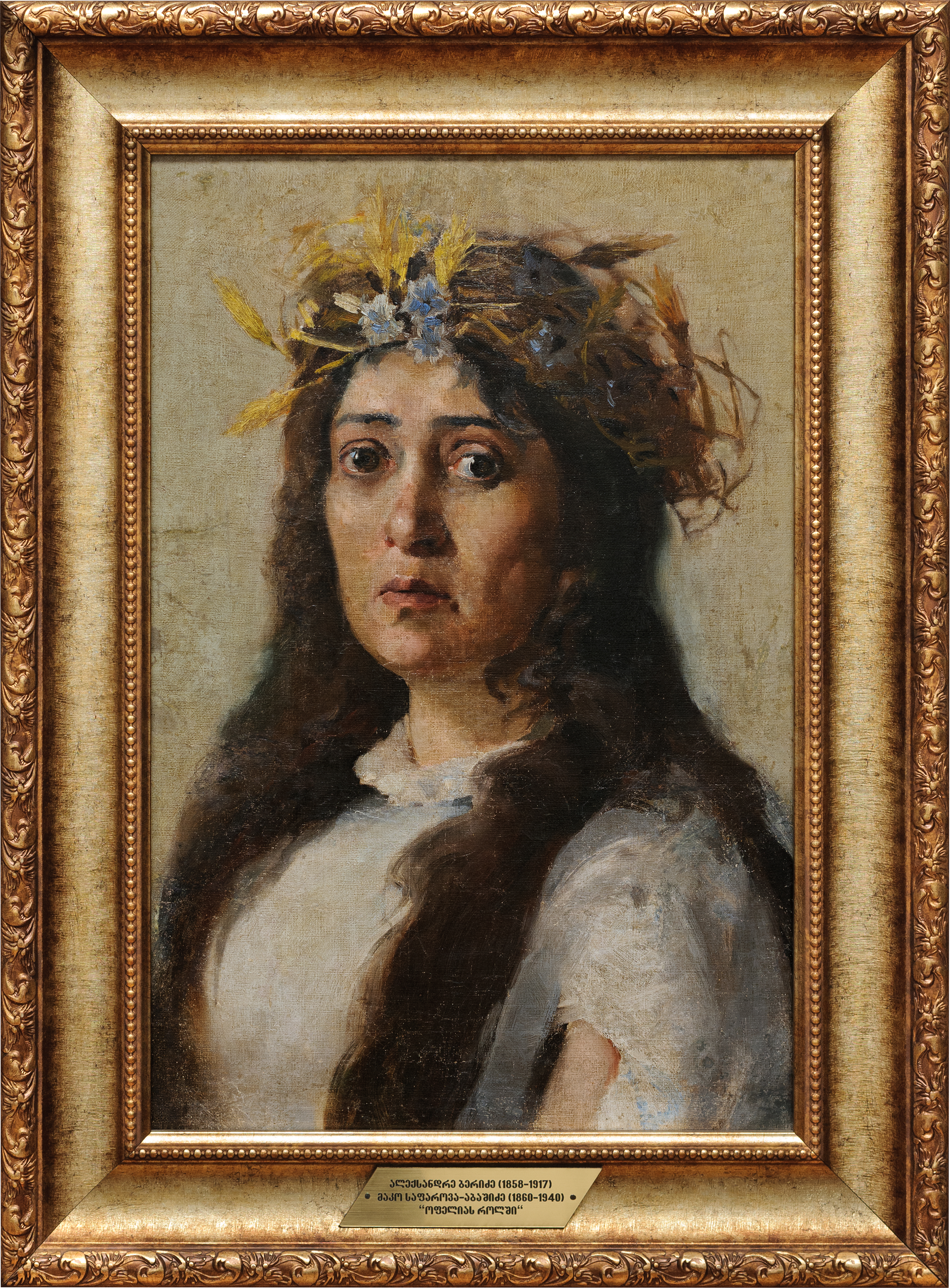 Portrait of Mako (Mariam) Sapharova-Abashidze, as character of Ophelia. Painted by Aleksander Beridze